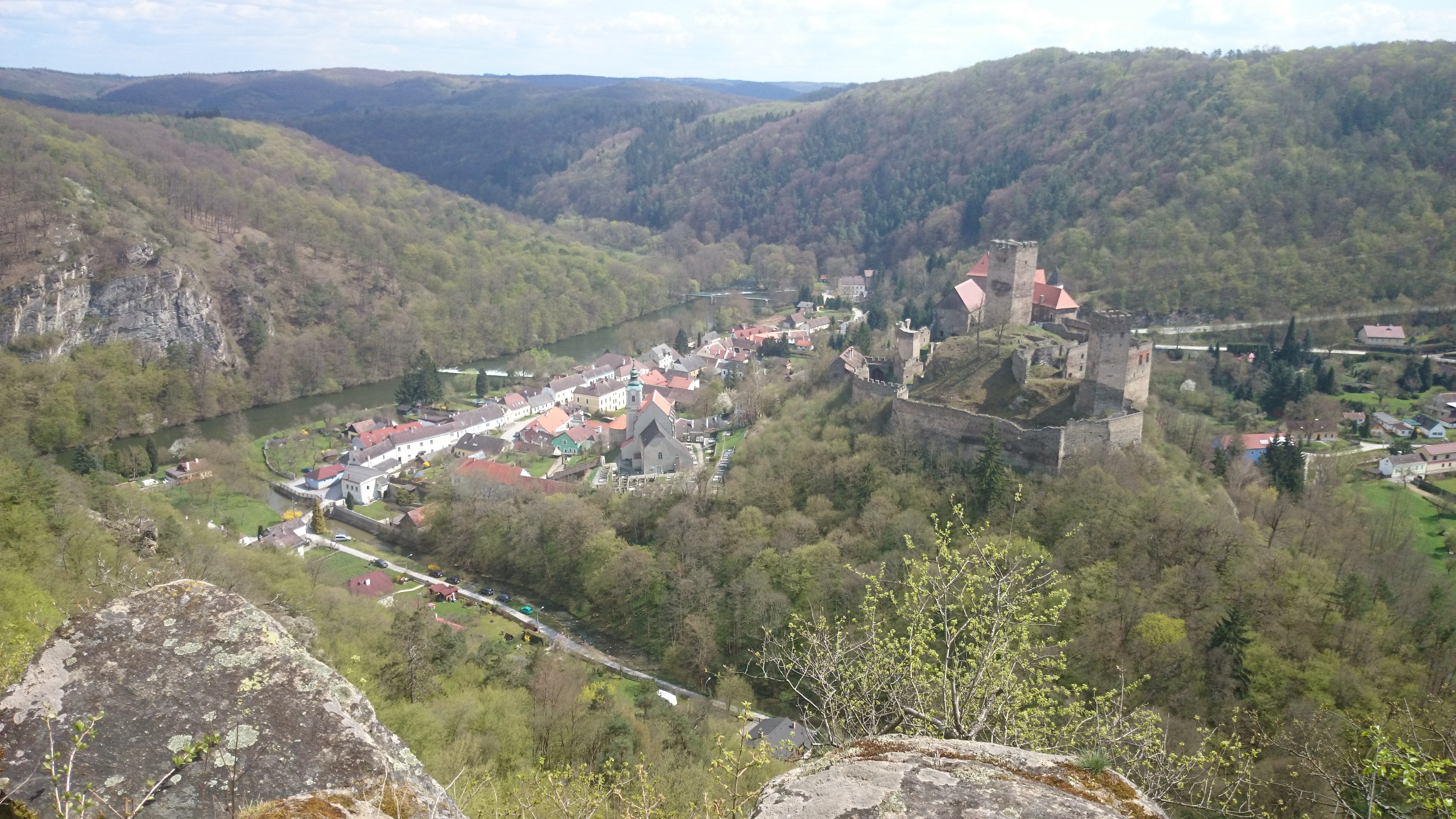 Blick vom Maxplateau auf die Hardgger Burg und Altstadt - empfehlenswerte Rundwanderung über Reginafelsen This file shows the National Park Thayatal in Austria.